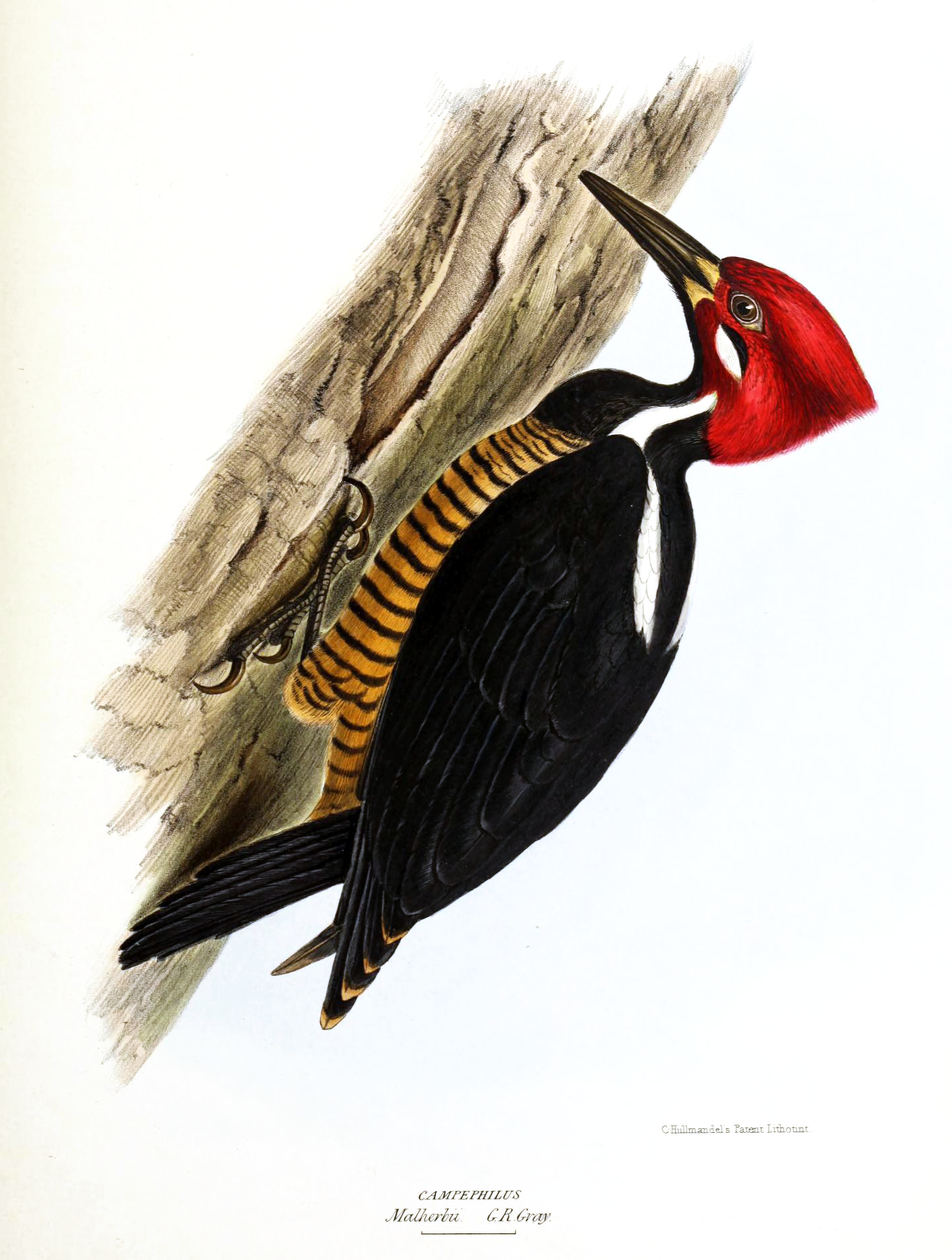 Campephilus melanoleucos malherbii